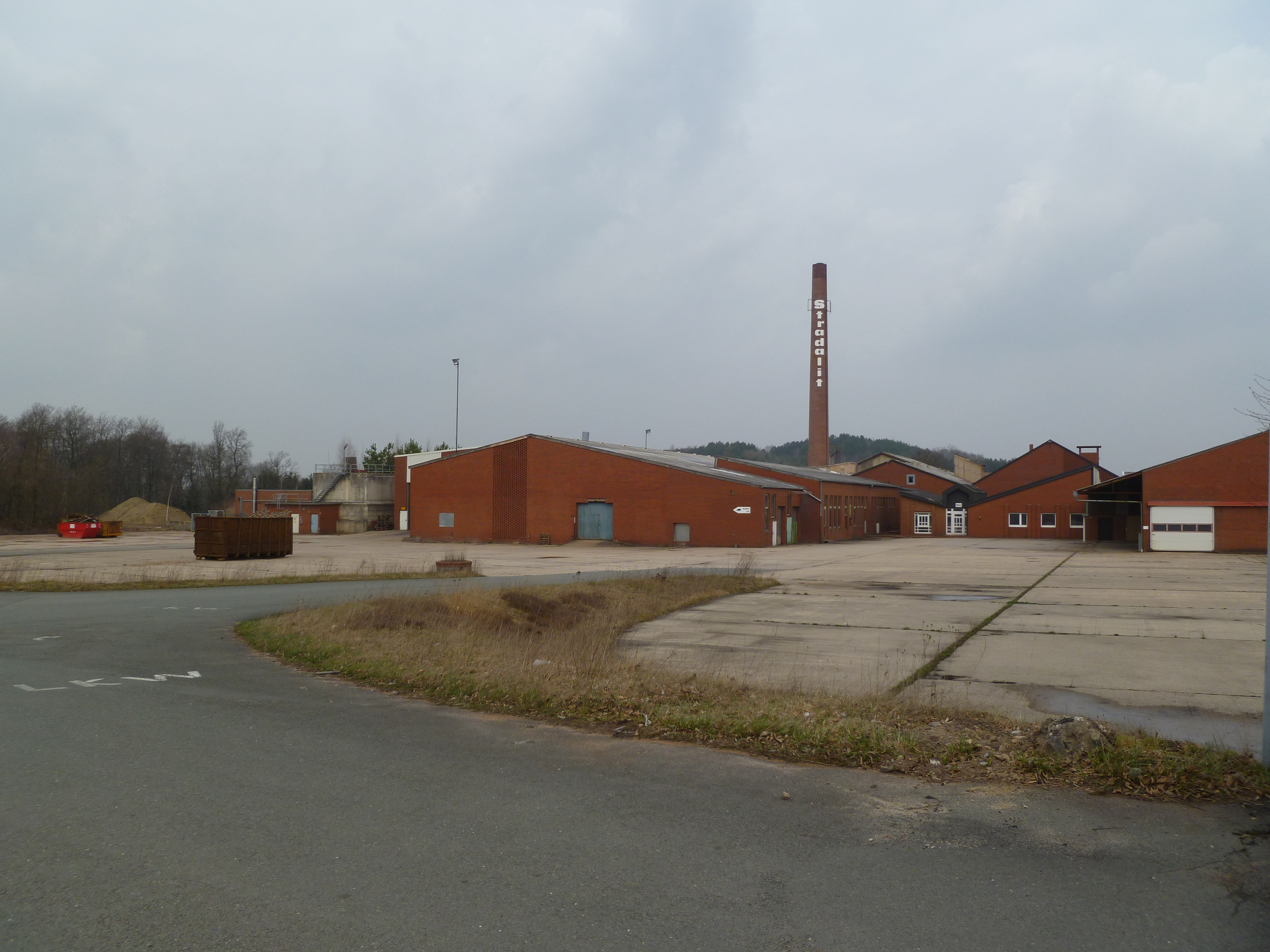 Verlassene ehemalige Ziegelei Stradalit auf dem Dickenberg.